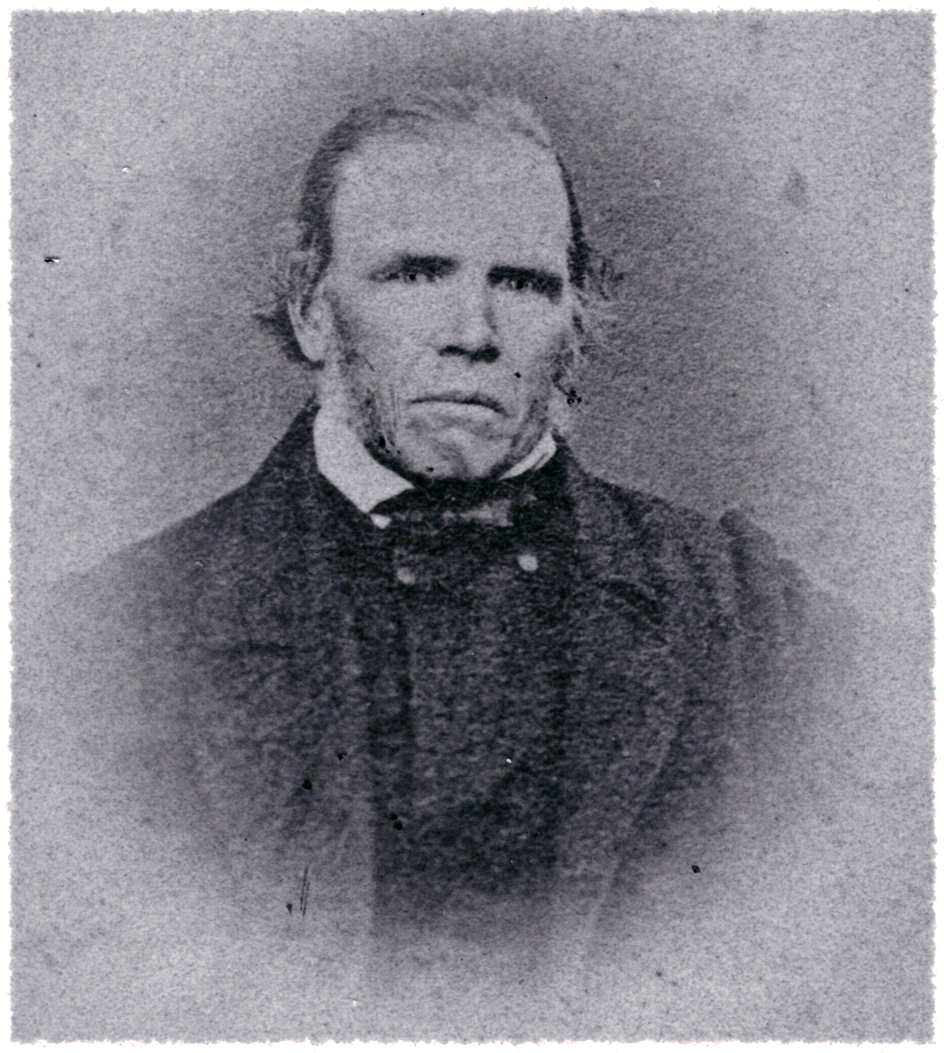 Porträttfoto av sockensmeden och evangelisten Per Norin (1806–1873) i Kungsgården, Norrala (Söderhamns kommun), Hälsingland